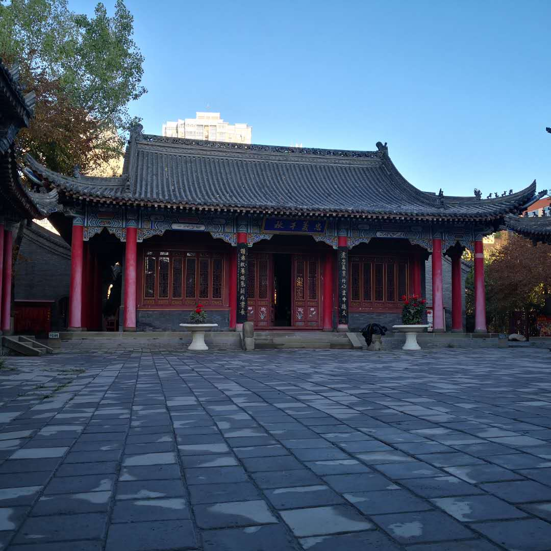 中文（中国大陆）: 乌鲁木齐文庙关帝殿